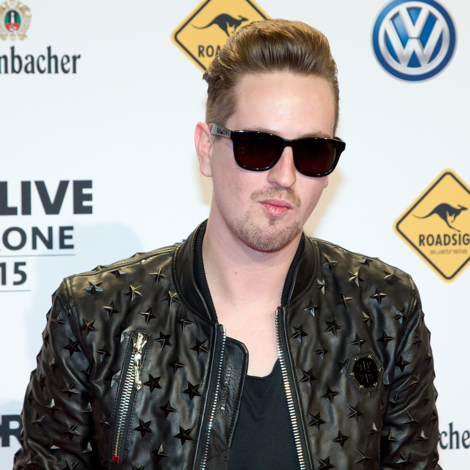 1LIVE Krone 2015 - Robin Schulz